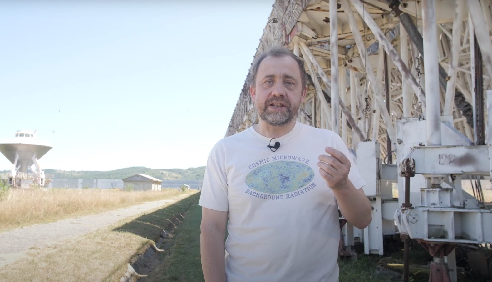 Олег Верходанов - один из ведущих российских космологов, специалист по обработке карт реликтового излучения. На фоне - телеском РАТАН - 600